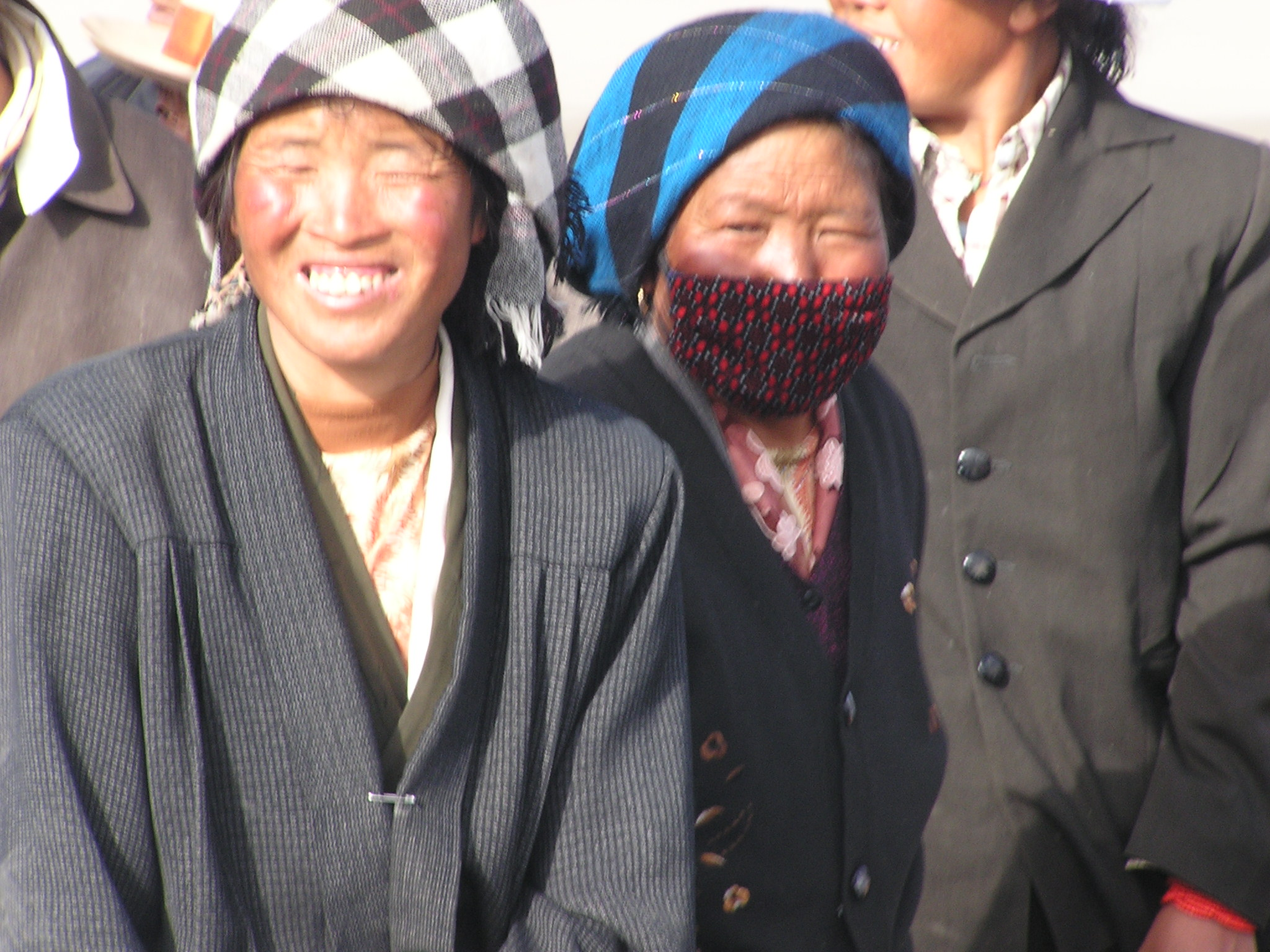 Brahmaputra 11